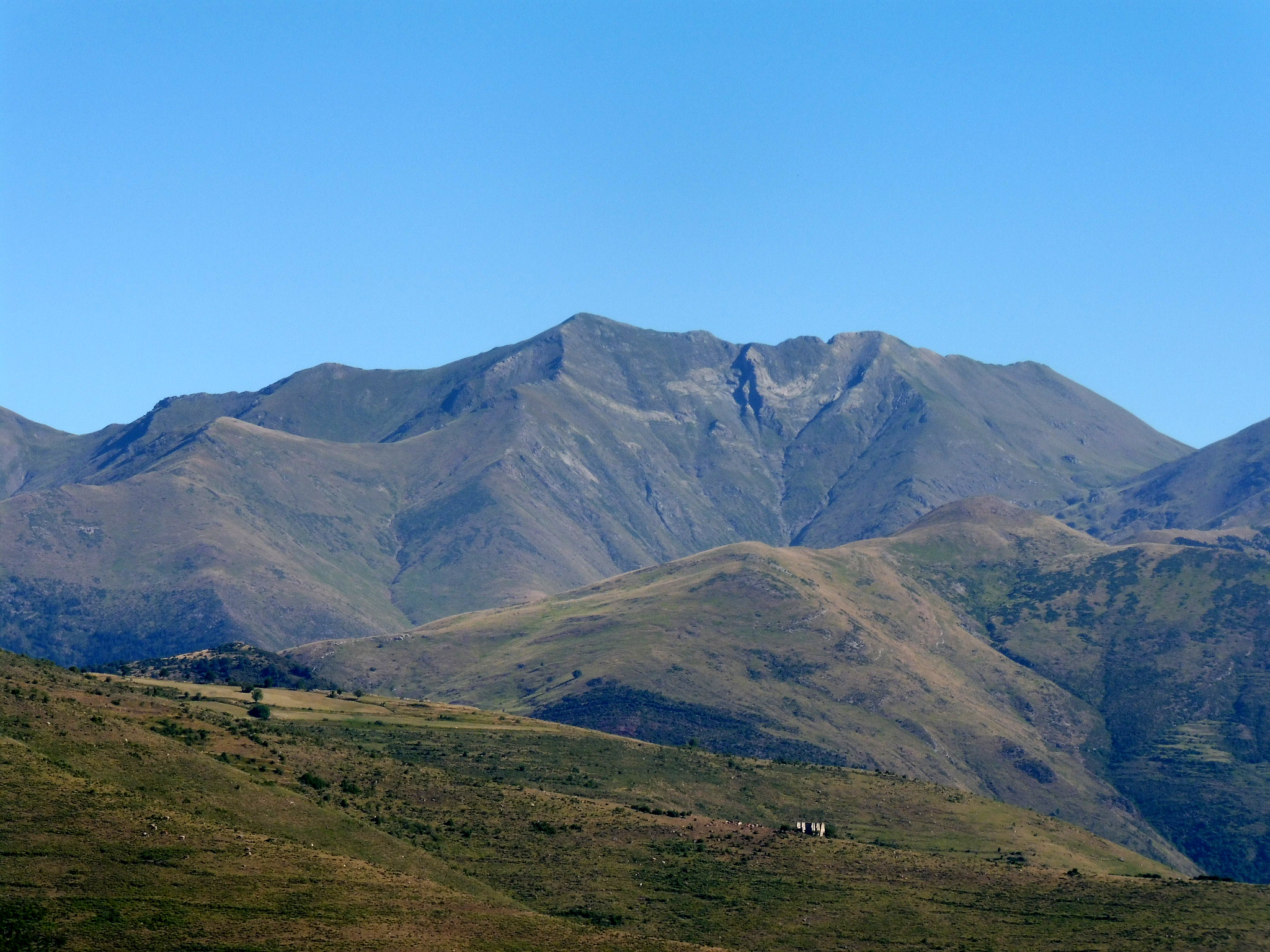 El Cap dels Vedats d'Erta des del coll de la Creu de Perves (Alta Ribagorça)